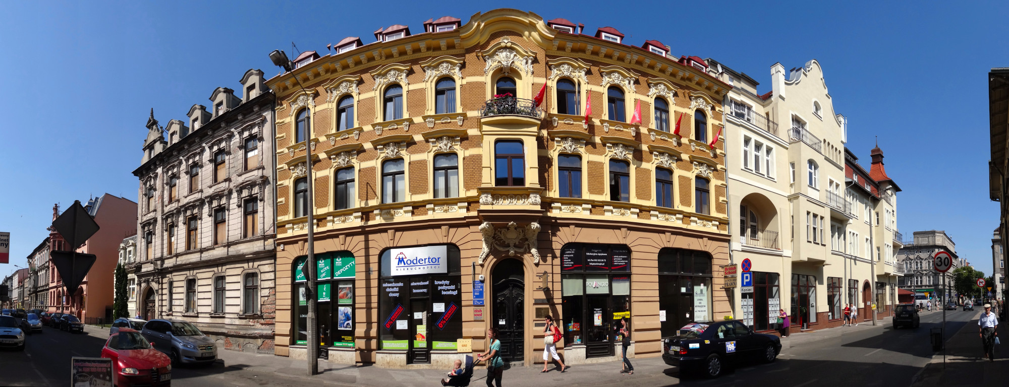 Ulica Jana i Jędrzeja Śniadeckich w Bydgoszczy (nr 2-10)